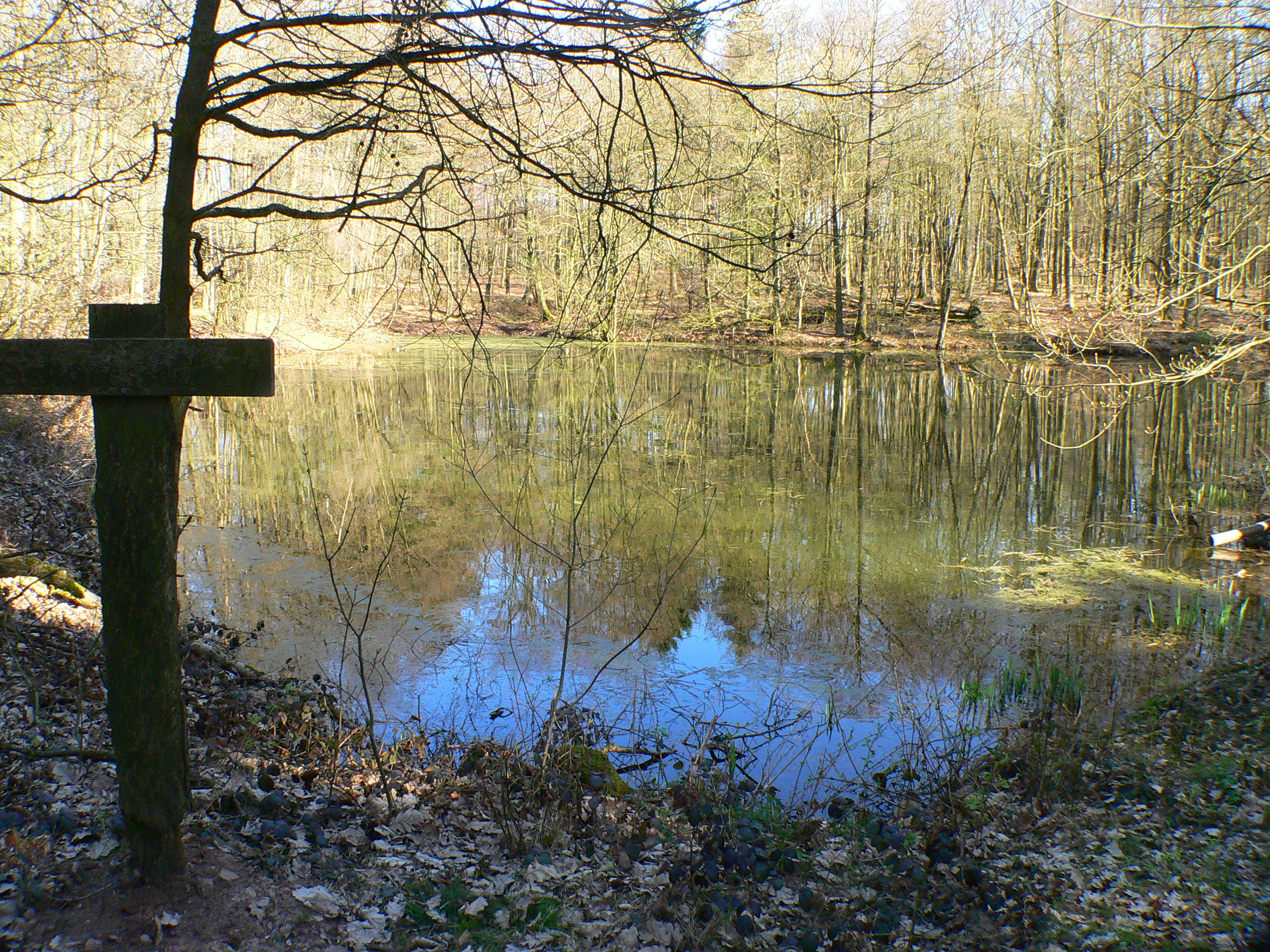 Schmeesser Teich der Wüstung Schmeessen im Solling (Niedersachsen, Deutschland)